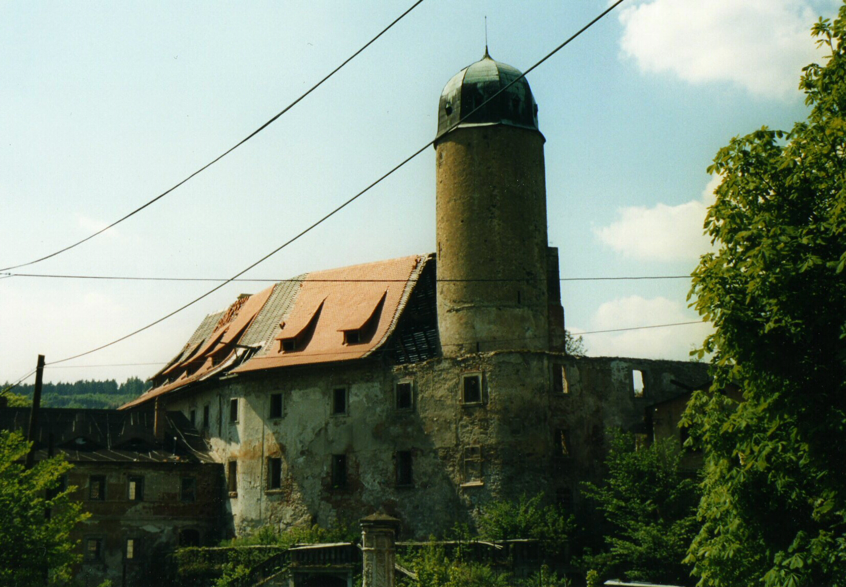 Česky:Zámek Libá (stav v roce 2000) Deutsche:Ansicht von Schloss Liebenstein (heute Libá)